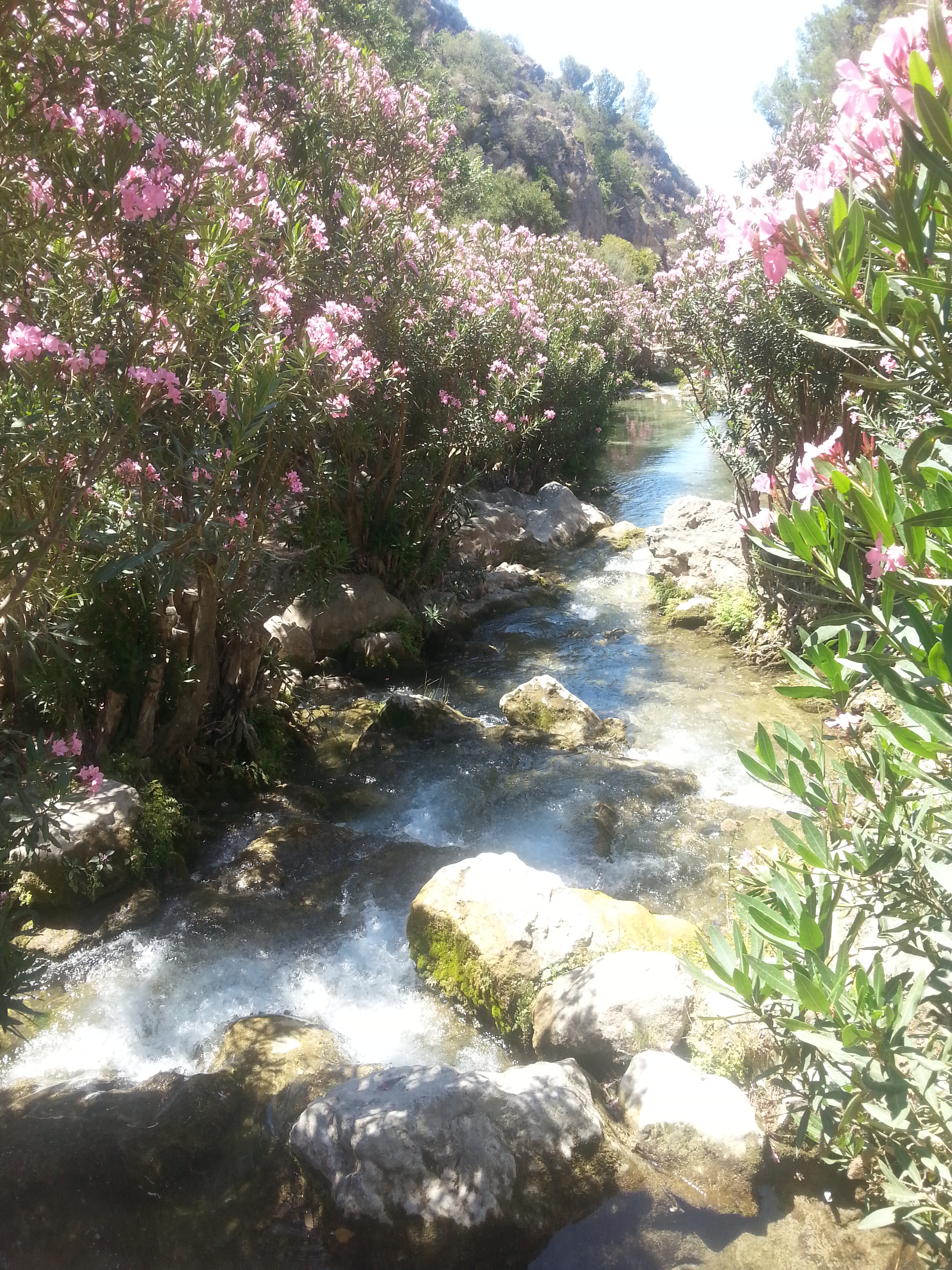 las fuentes del Algar, Altea (valencia,España)